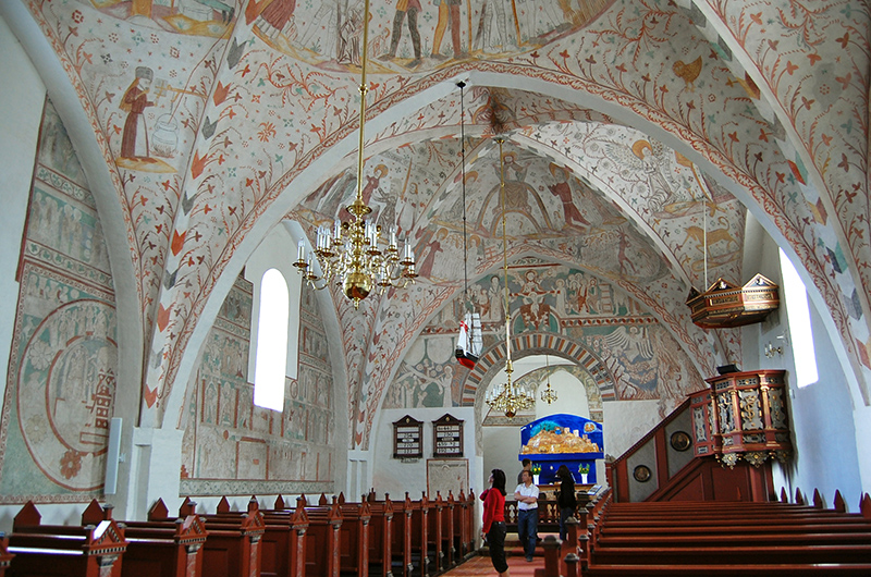 Keldby Kirke